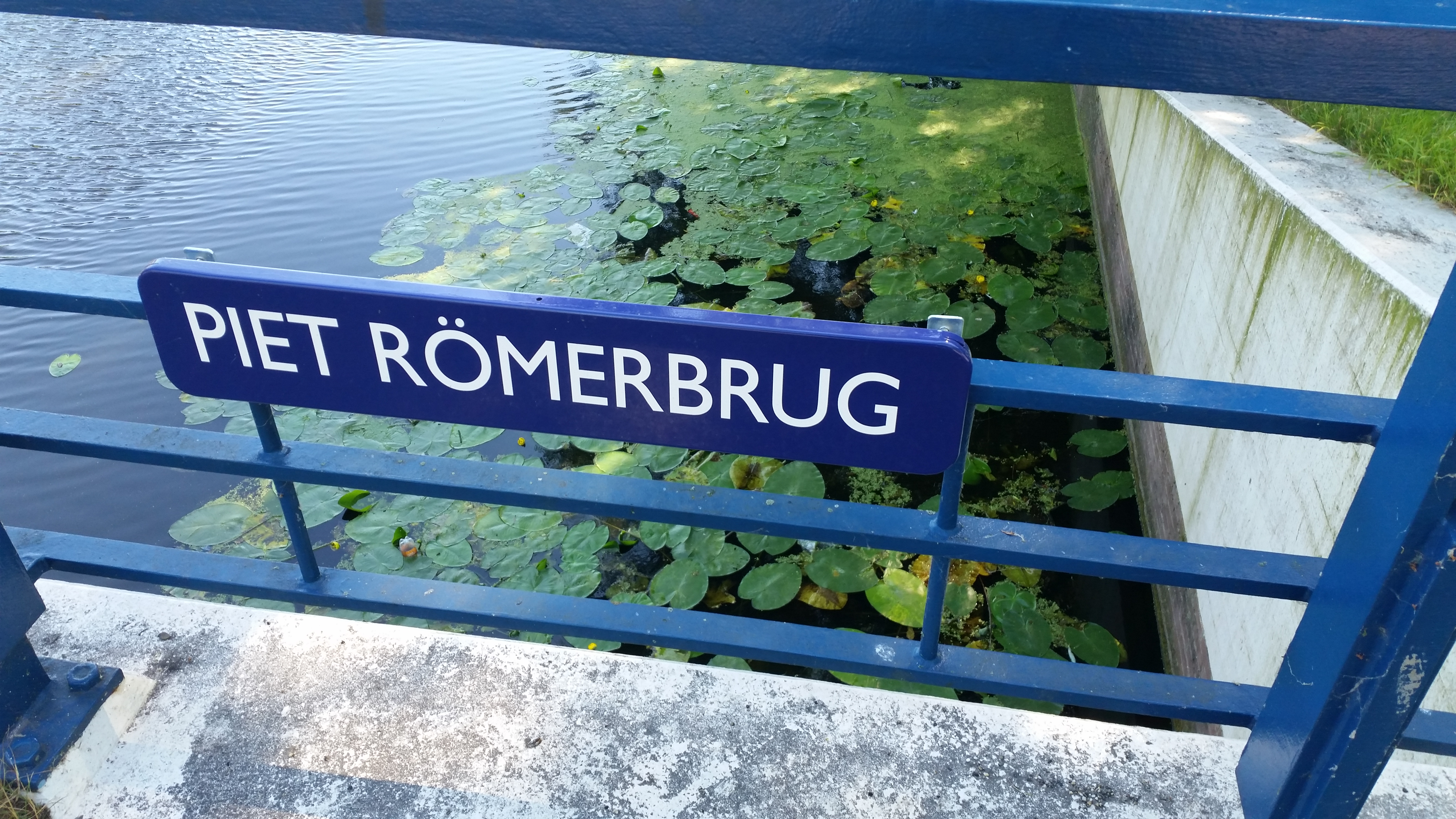 Brug 711, naamplaatje